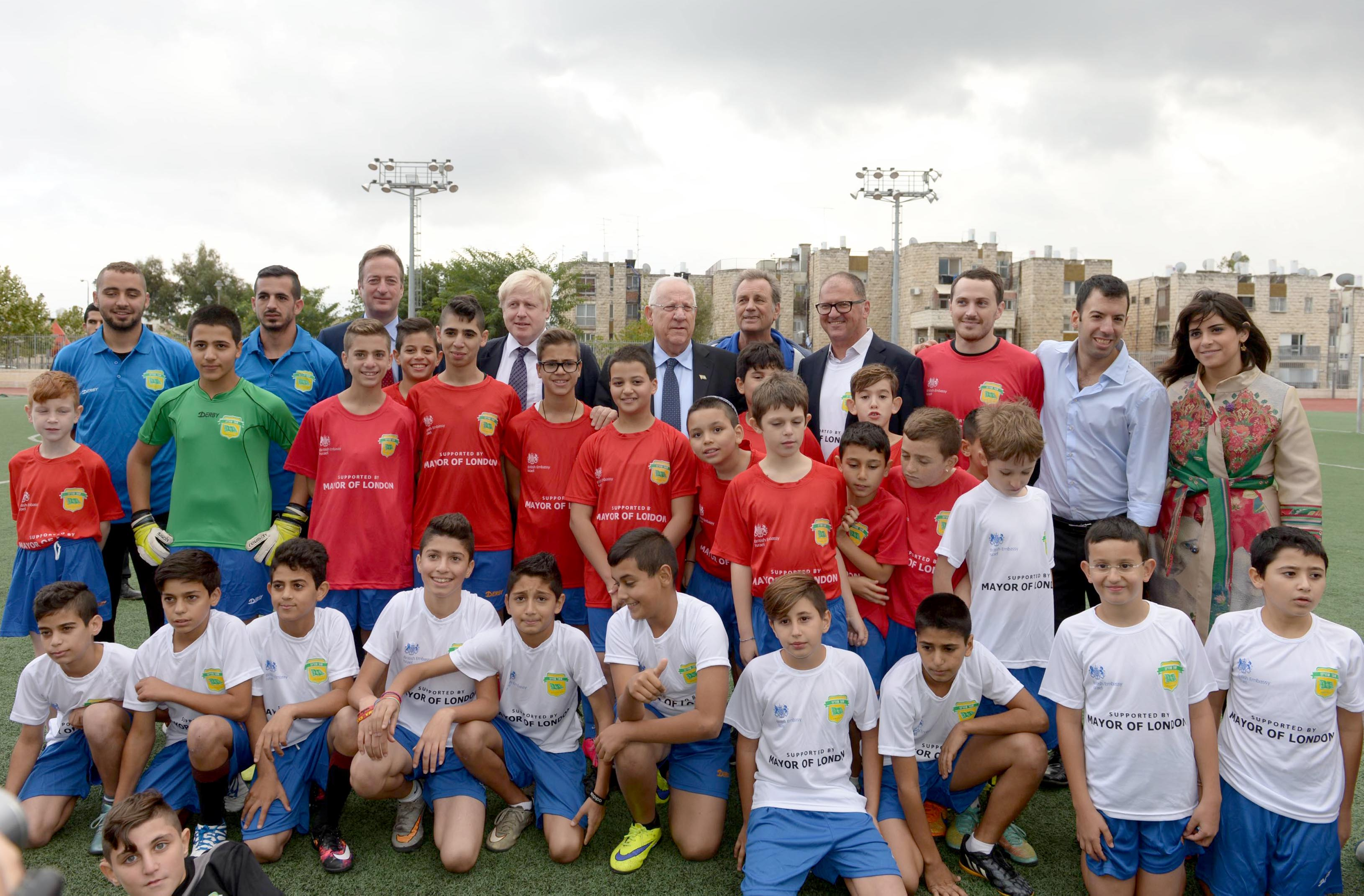 נשיא מדינת ישראל ראובן ריבלין עם ראש עיריית לונדון בוריס ג'ונסון, באירוע פתיחת עונת הכדורגל של עמותת הכדורגל של הילדים "שער שוויון"